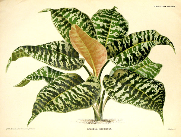 Dracaena goldieana Lindley